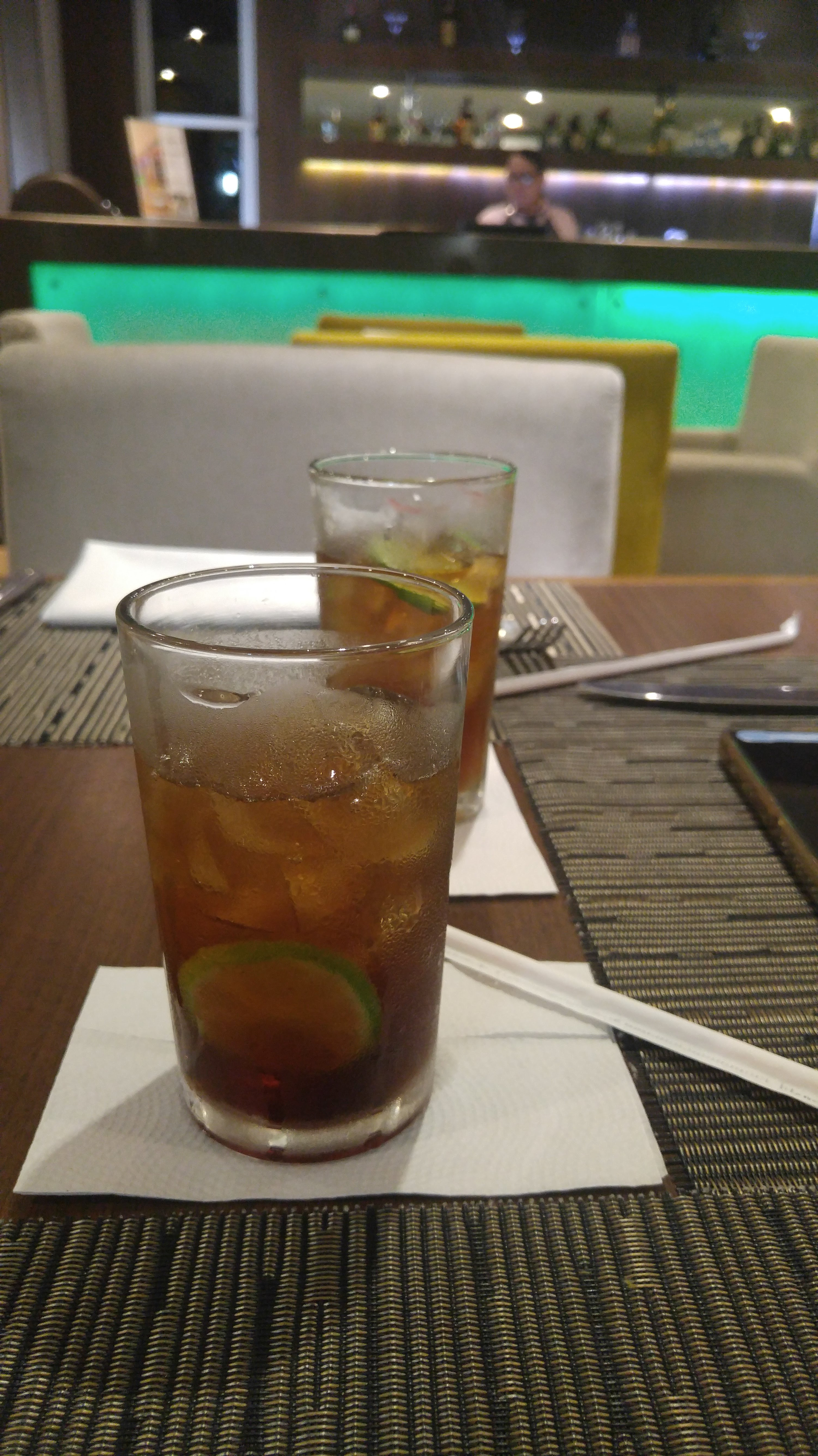 Bebida Cuba Libre